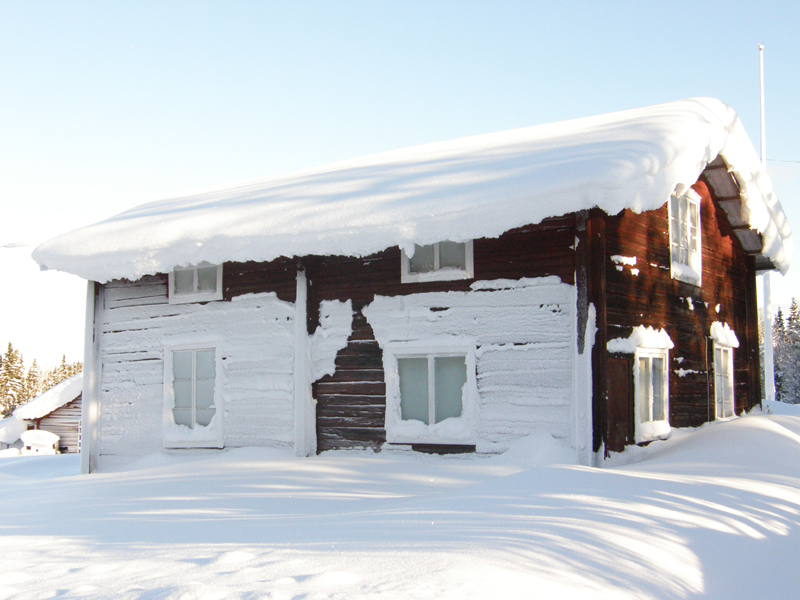 Huset där Postkontoret i Kroksjö var beläget på 50-talet.